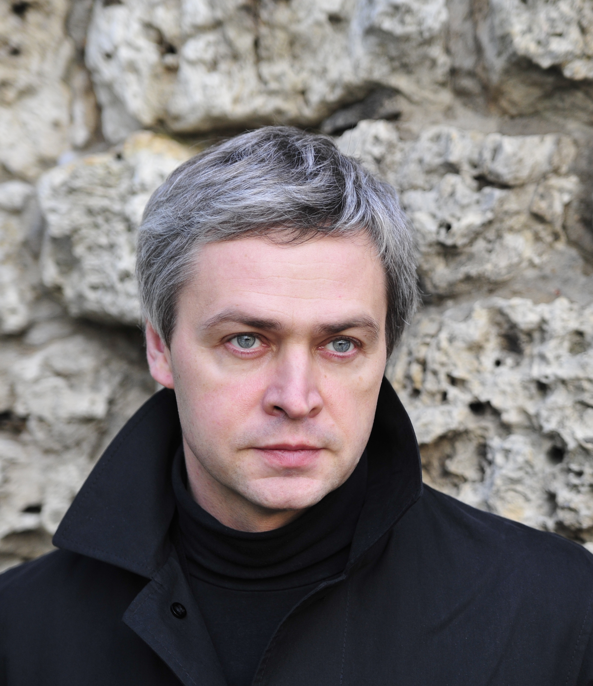 Кинорежиссер Сергей Зайцев